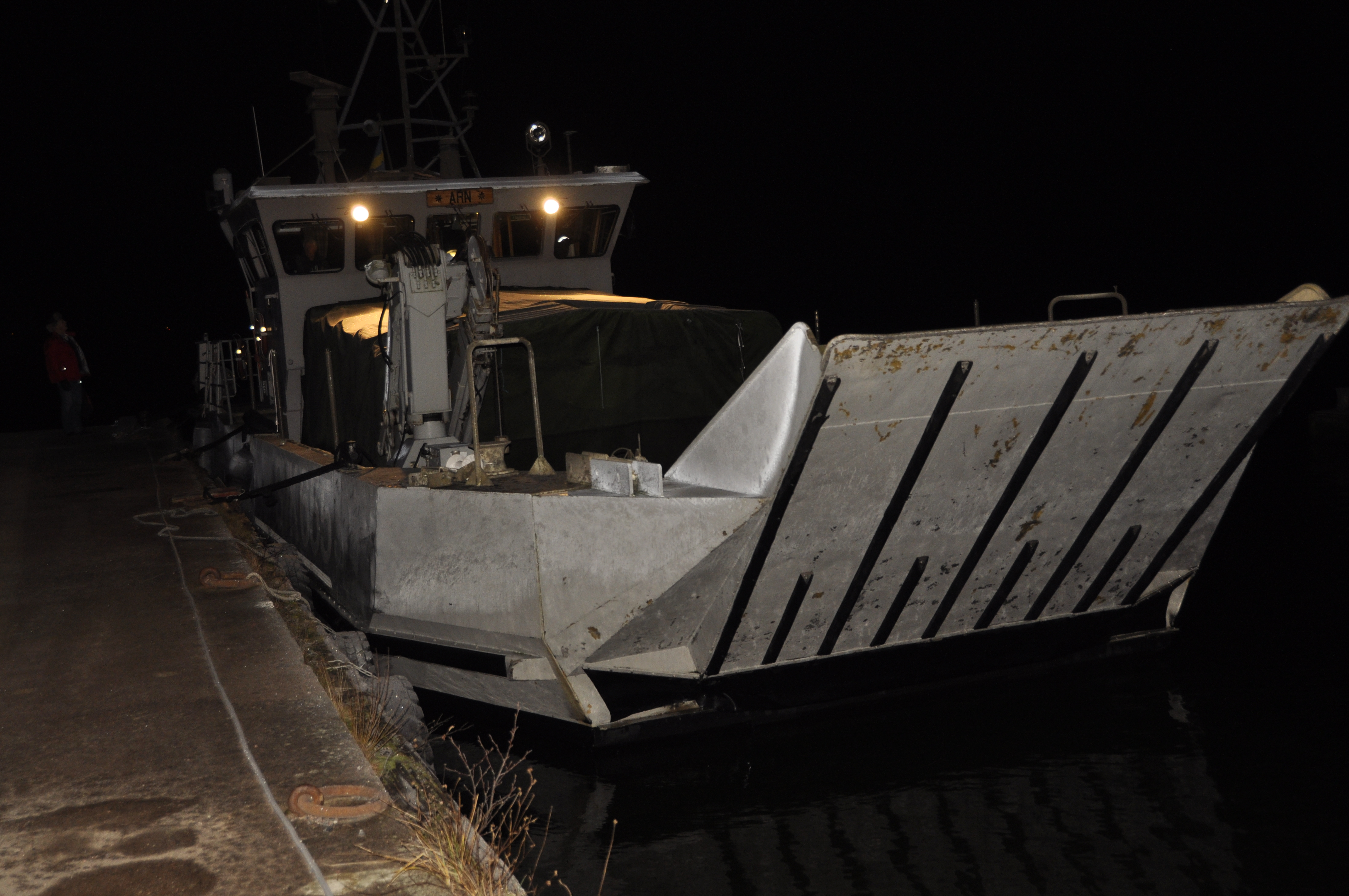 Trossbåt SVK 655 Arn, ägd av Roslagens Sjövärnskår